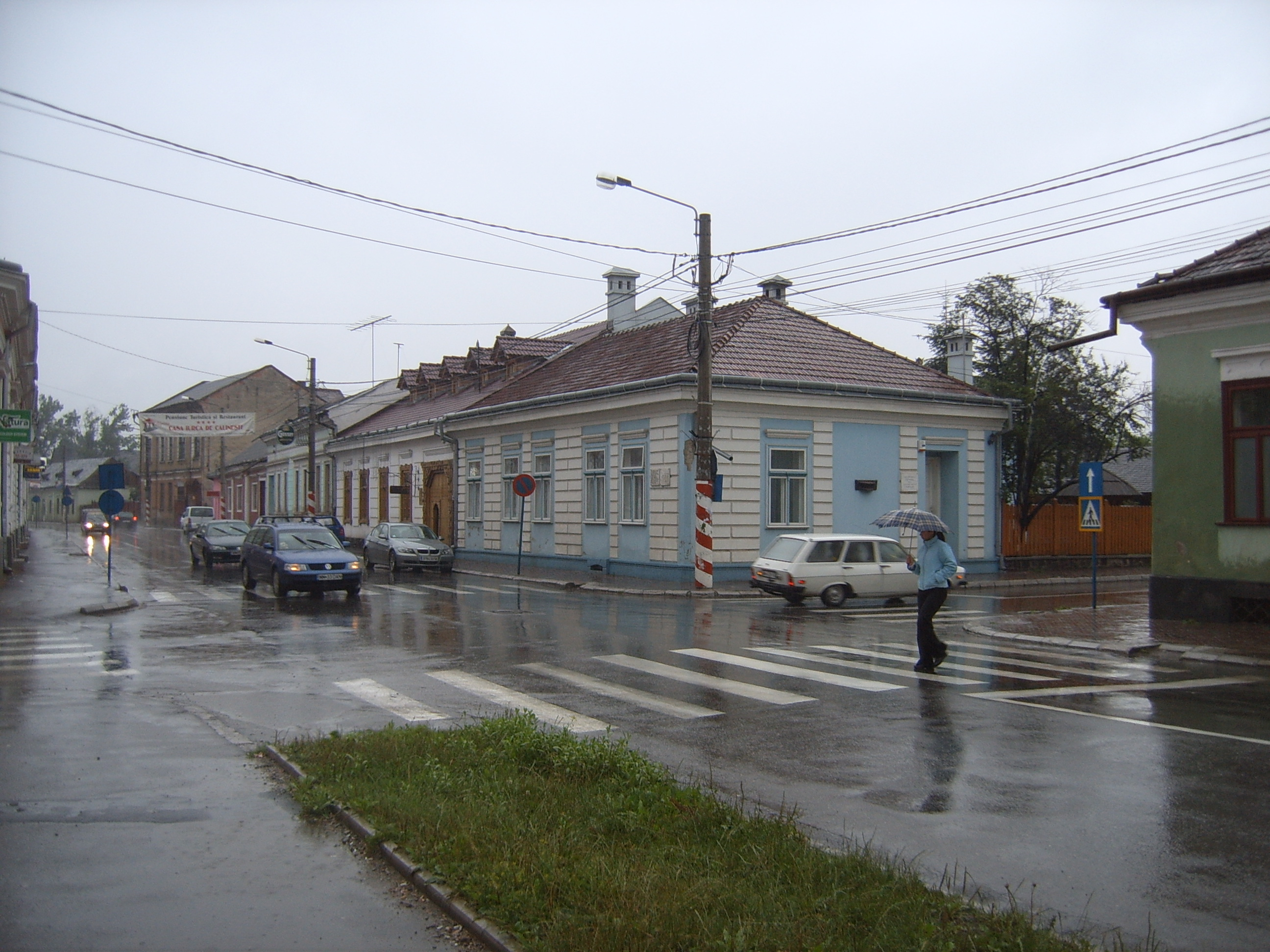 Maison natale d'Elie Wiesel à Sighetu Marmaţiei, Roumanie